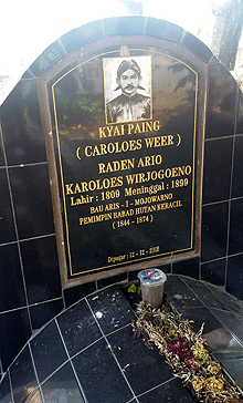 Makam Karolus Wiryoguno (Kyai Paing) di Mojowangi, Mojowarno, Jombang, berdampingan dengan makam istrinya Yosibah Dariyah.